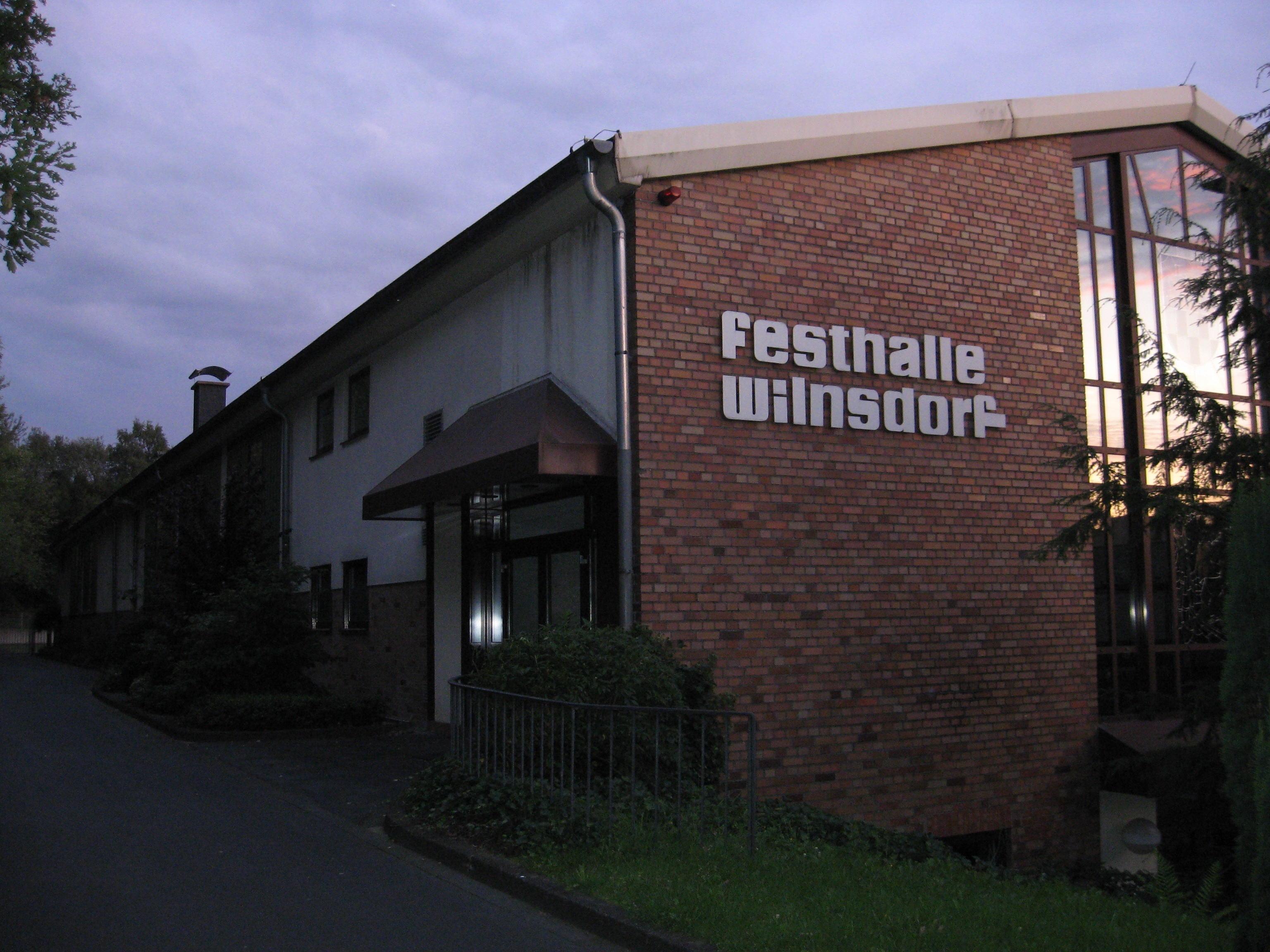 Die Festhalle in Wilnsdorf, eine umgebaute Industriehalle, genutzt für Aufführungen, Ausstellungen und Börsen.